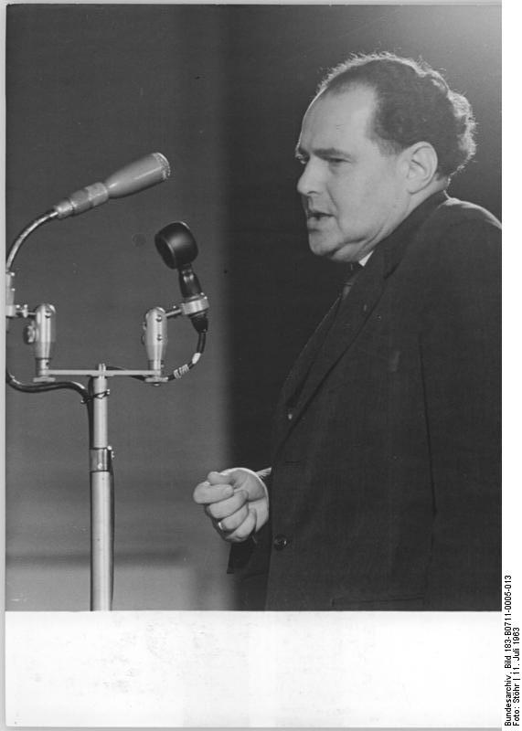 Oberstes Gericht, Globke-Prozess, Aussage, Helmut Aris Zentralbild Stöhr-11.7.1963 1. Strafsenat setzte Verhandlung gegen Globke fort. Der 1. Strafsenat des Obersten Gerichts der DDR setzte am 11.7.1963 die Hauptverhandlung gegen den millionenfachen Judenmörder Globke fort. Im Mittelpunkt steht heute der Komplex der berüchtigten "Endlösung der Judenfrage". Wie am Vortage sagten zahlreiche Zeugen aus, die die faschistische Judenverfolgung am eigenen Leibe erlebten. UBz: Der Zeuge Helmut Aris aus Dresden, Präsident des Verbandes der jüdischen Gemeinden in der DDR, erhob erschütternde Anklage für Millionen seiner erschossenen, erschlagenen, ermordeten und vergasten Glaubensbrüder. Seine Mutter wurde bereits mit den ersten Judentransport aus Dresden deportiert und 28 seiner nächsten Angehörigen sah er nie wieder.